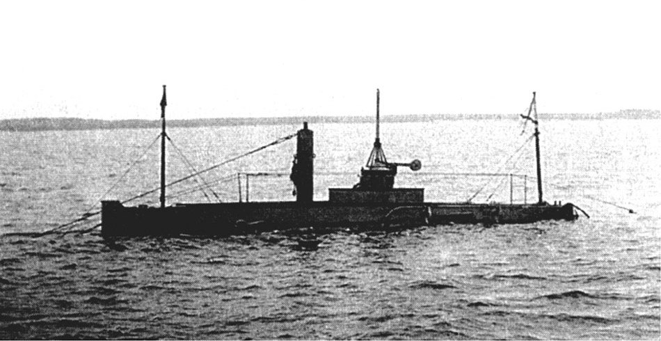 Подводная лодка "Дельфин" на испытаниях в Финском заливе